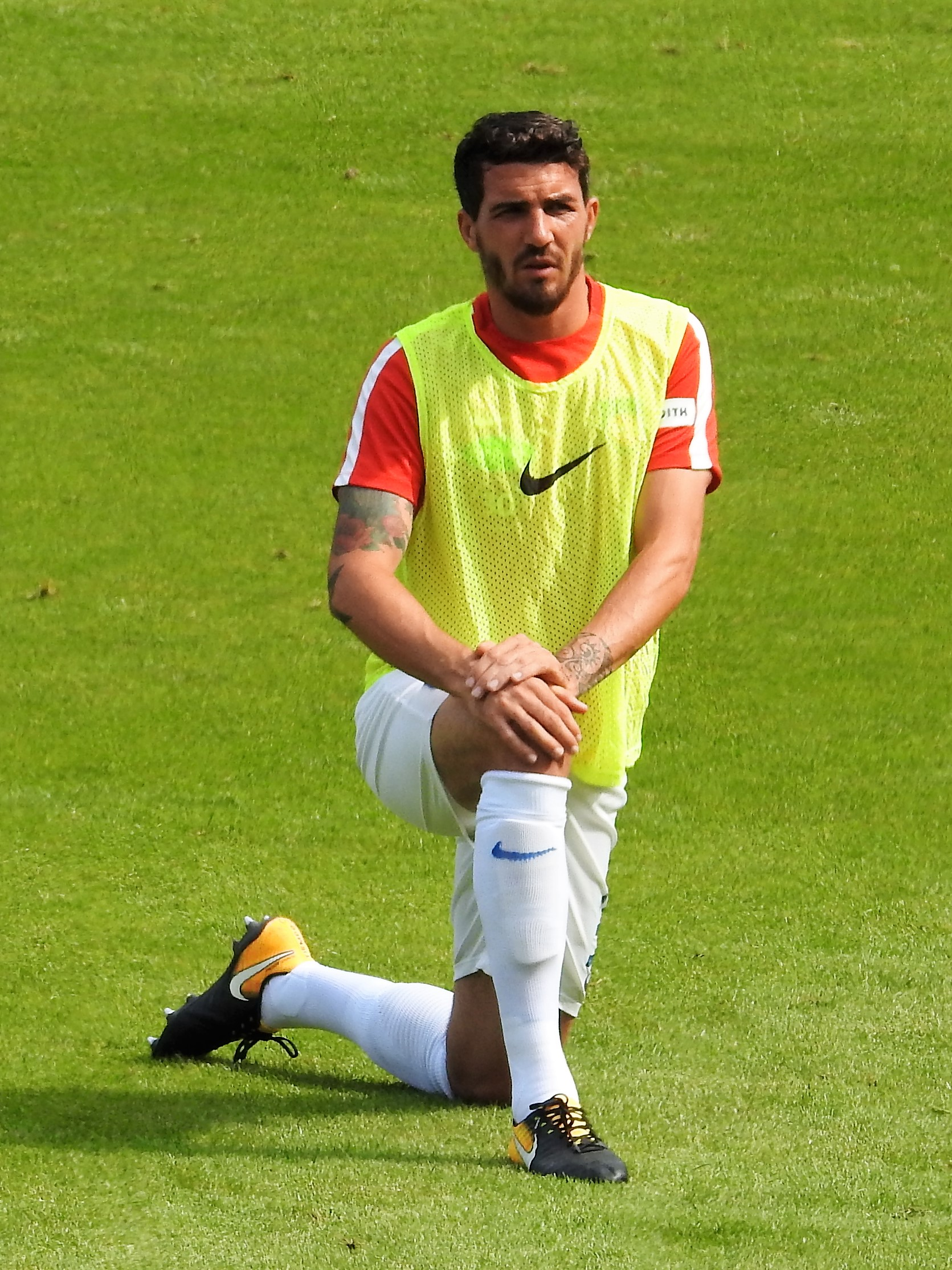 Norman Theuerkauf